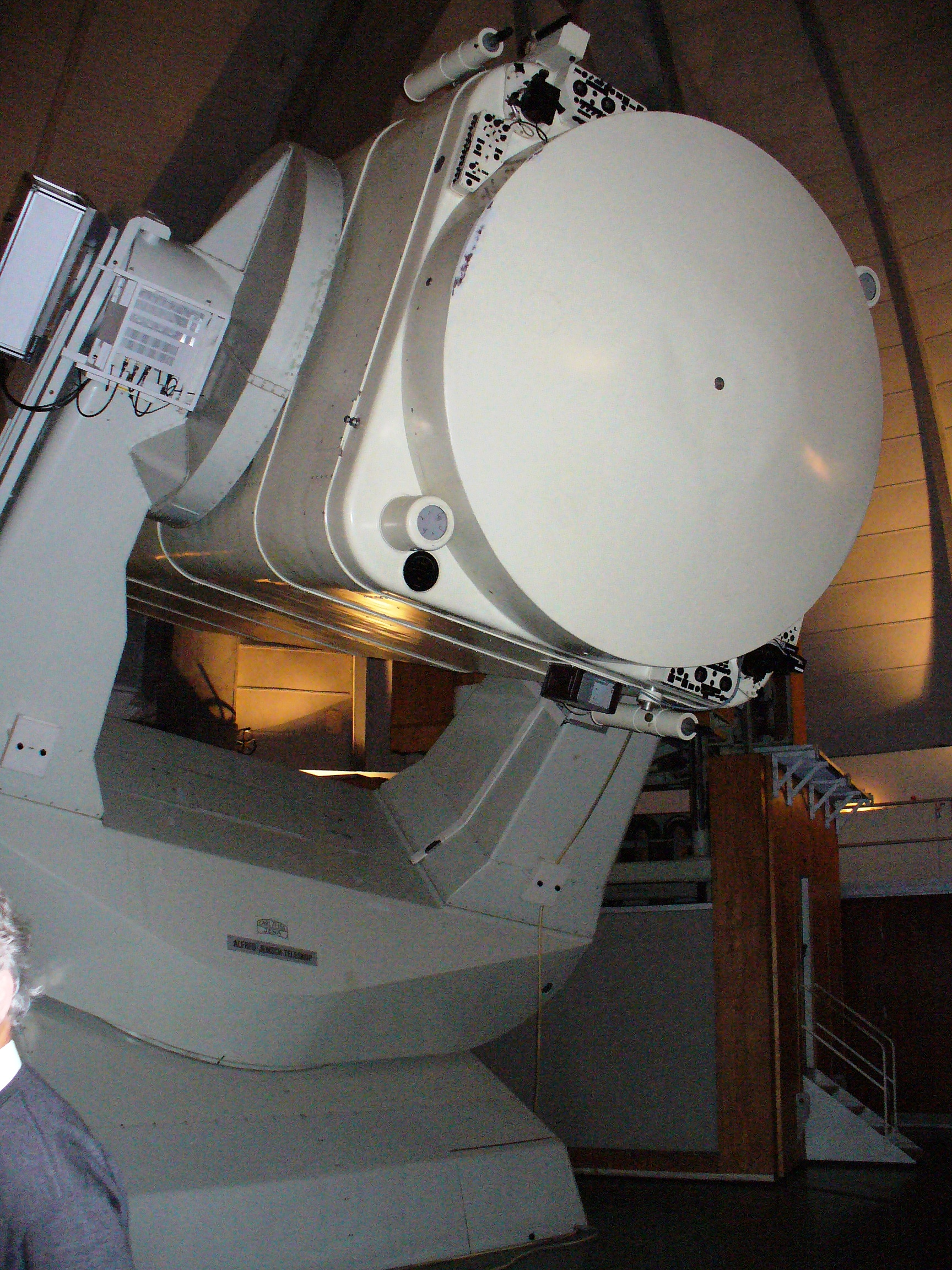 2 Meter Schmidt-Teleskop auf parallaktischer Gabelmontierung in Tautenburg (Thüringen)